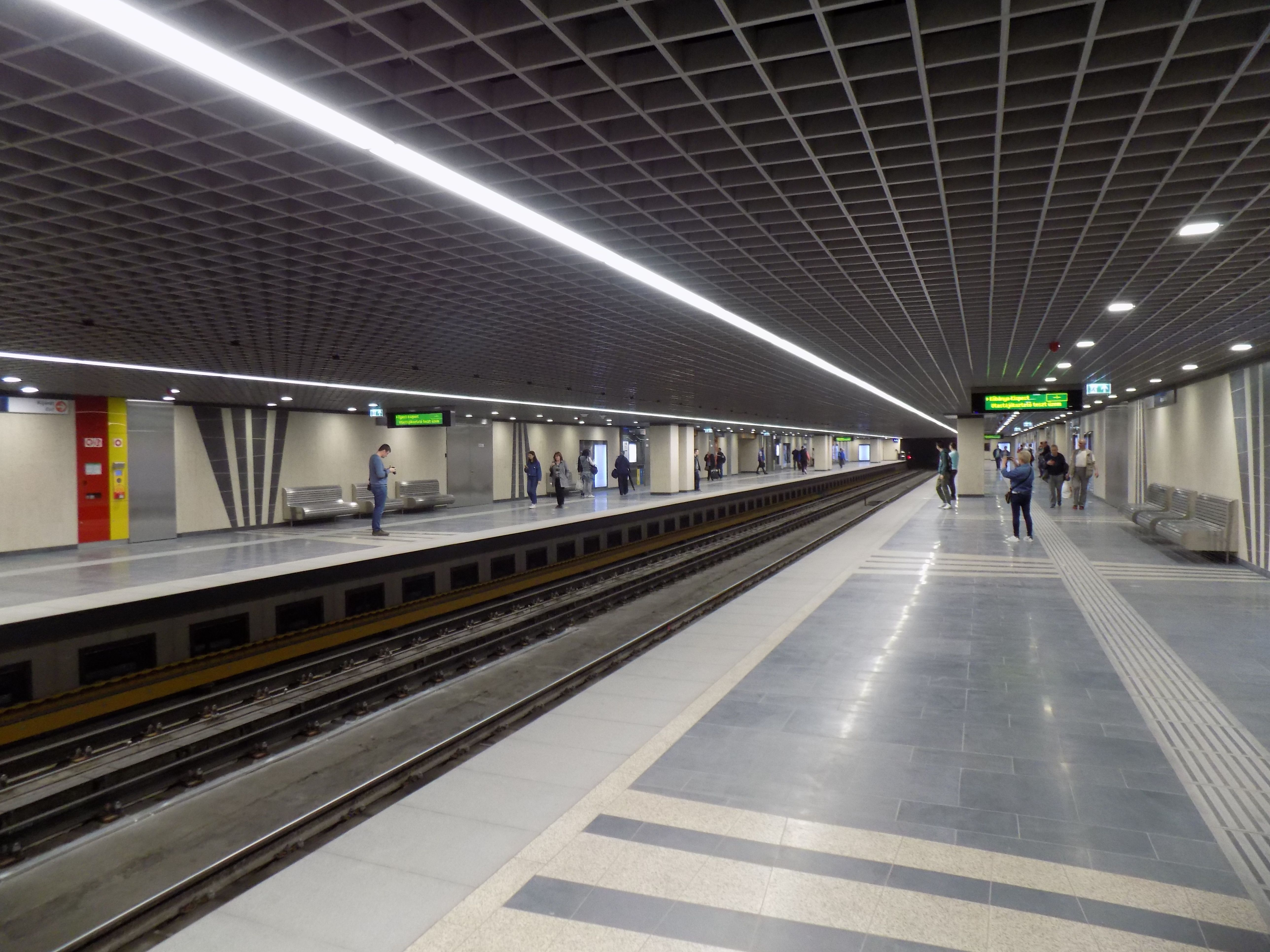 A budapesti M3-as metróvonal felújított Árpád híd állomása